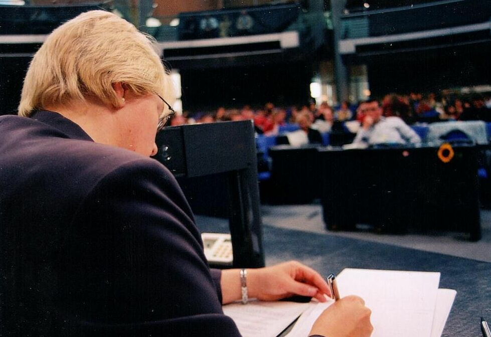 Eine Bundestags-Stenografin schreibt eine Debatte im Plenarsaal des Reichstagsgebäudes mit. Links von der Stenografin auf ihrer Ohrhöhe (im Bild gleich rechts neben ihrer Nase) ist übrigens ein kleiner Lautsprecher, der die vom Redner gesprochenen Worte verstärkt - was bei Unruhe im Saal sehr wichtig ist. Die Bundestagsstenografen schreiben nicht nur die Worte des Redners mit, sondern notieren gleichzeitig auch Beifall und Zwischenrufe (möglichst mit dem richtigen Namen des Rufers, bzw. der Angabe der Fraktion [der Bundestag hat über 600 Abgeordnete]). Die Stenografen im Bundestag wechseln sich nach 5 Minuten ab und diktieren anschließend das Mitgeschriebene einer Schreibkraft. Ein zweiter Kollege (Revisor) schreibt 30 Minuten mit, er kontrolliert (revidiert) später die Mitschriften der Stenografen. Das sofortige Abarbeiten der Mitschriften ist erforderlich, damit der Sitzungsbericht bereits am nächsten Tag veröffentlicht werden kann. Inzwischen gibt es, bei wichtigen Debatten, Vorabfassungen bereits am Sitzungstag, veröffentlicht auf der Internet-Seite des Bundestages.